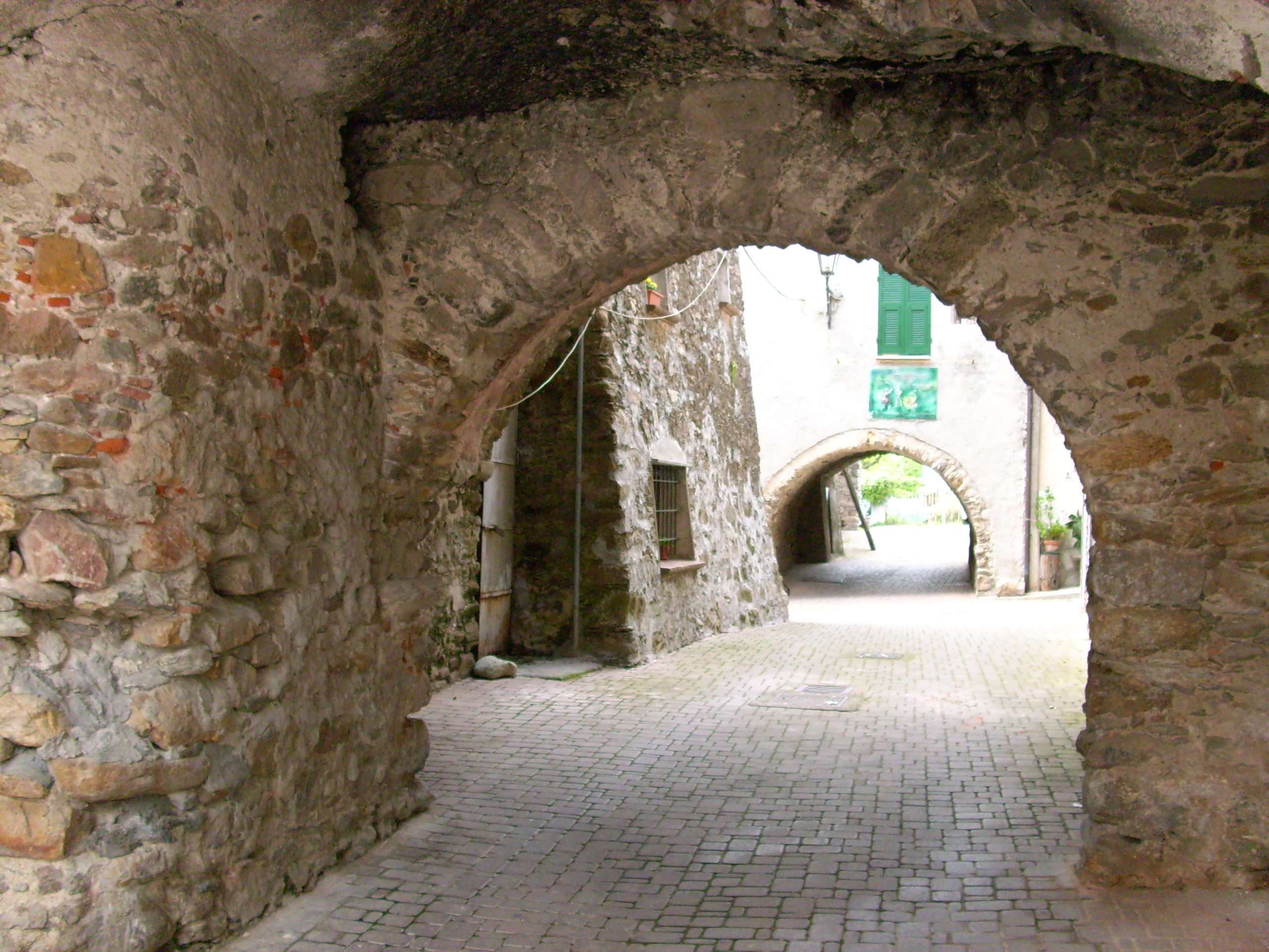 Centro storico di Bardineto, Liguria, Italia